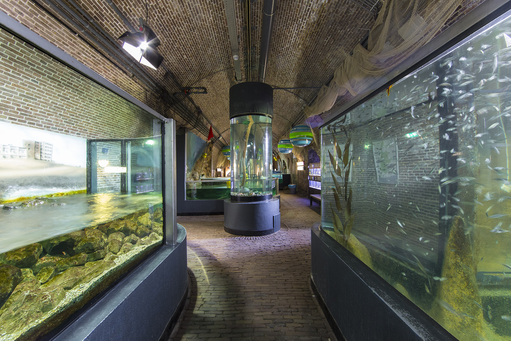 noordzeeaqaurium in beuk 1